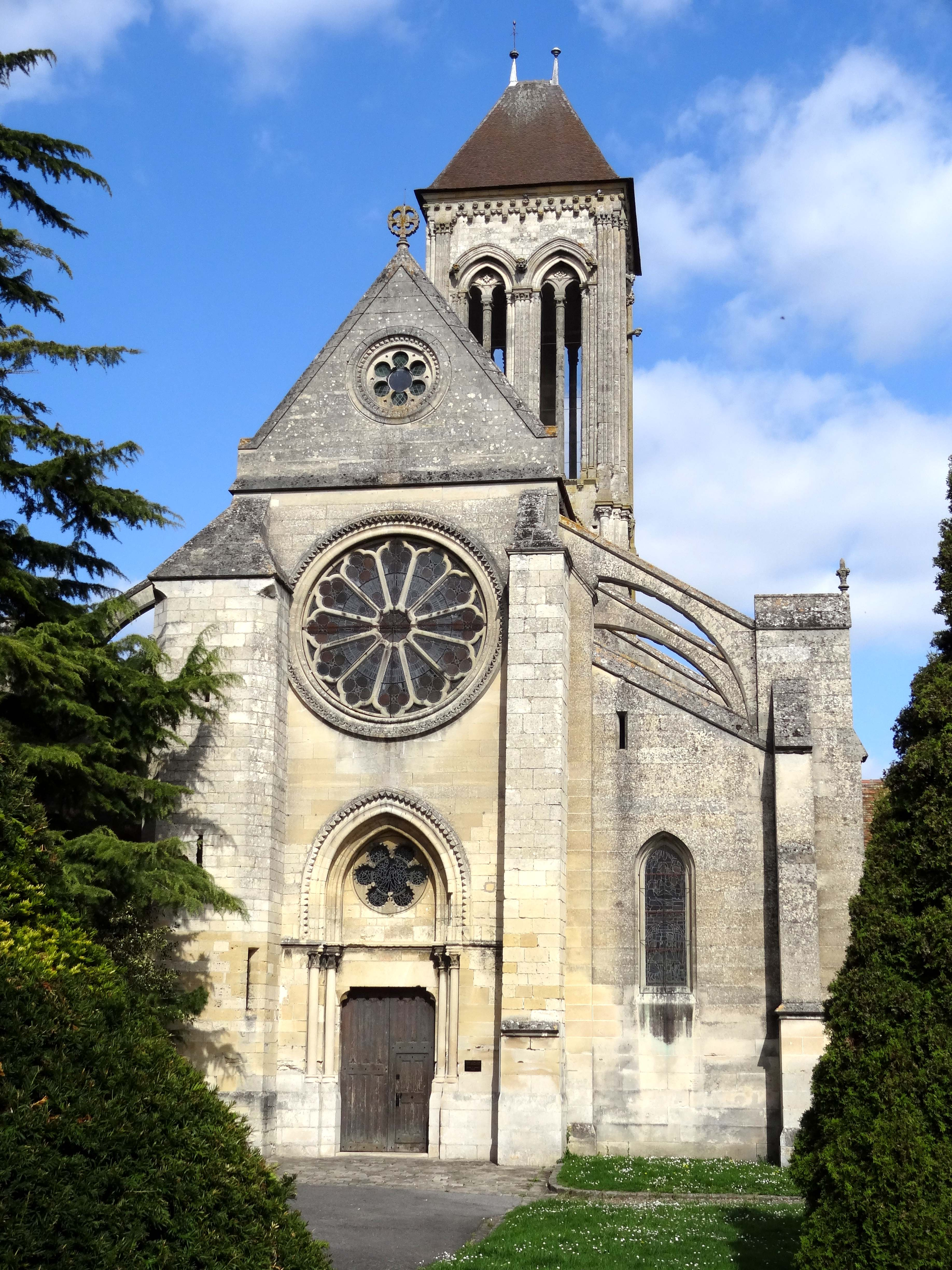 La façade occidentale de l'église.